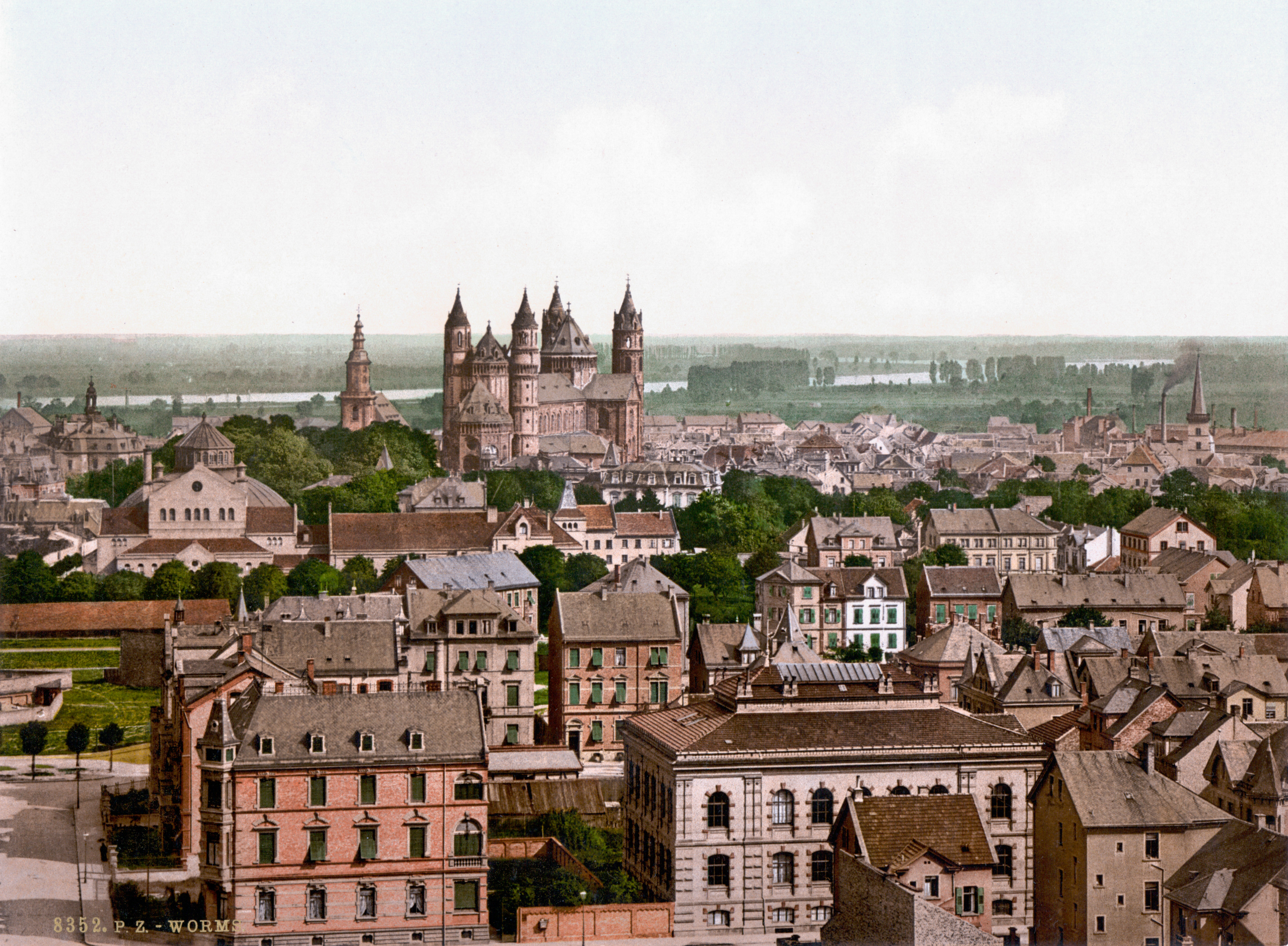 Worms